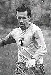 Title: FC Vorwärts Berlin - FC Carl Zeiss Jena 0:1 Factual corrections and alternative descriptions are encouraged separately from the original description. Additionally errors can be reported at this page to inform the Bundesarchiv. Original historic description: Zentralbild-Studré Stu-Qu 26.11.1966 Berlin: Fußball-Oberliga-Punktspiel FC Vorwärts Berlin gegen FC Carl Zeiß Jena 0:1 - Durch seinen wagemutigen Einsatz und seine glänzenden Paraden bewahrte der Jenaer Torwart Wolfgang Blochwitz (am Boden) seine Mannschaft vor einem Treffer. Links der Jenaer Spieler Peter Rock und rechts Jürgen Piepenburg (FC Vorwärts Berlin) können nicht mehr eingreifen. Der FC Vorwärts unterlag am 26.11.1966 im Berliner Jahn-Stadion in der Cantianstraße dem FC Carl Zeiss Jena mit 0:1 Toren.